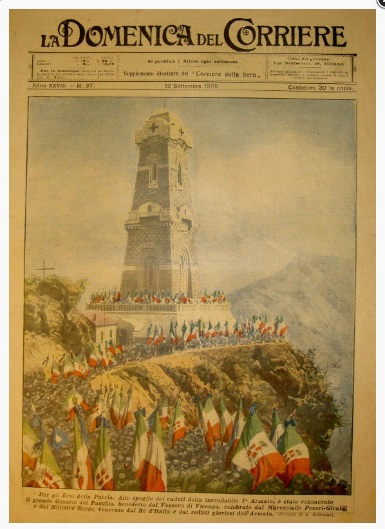 Domenica del corriere con copertina dedicata all'Ossario del Pasubio - 12 settembre 1926 Anno XXVIII n.37